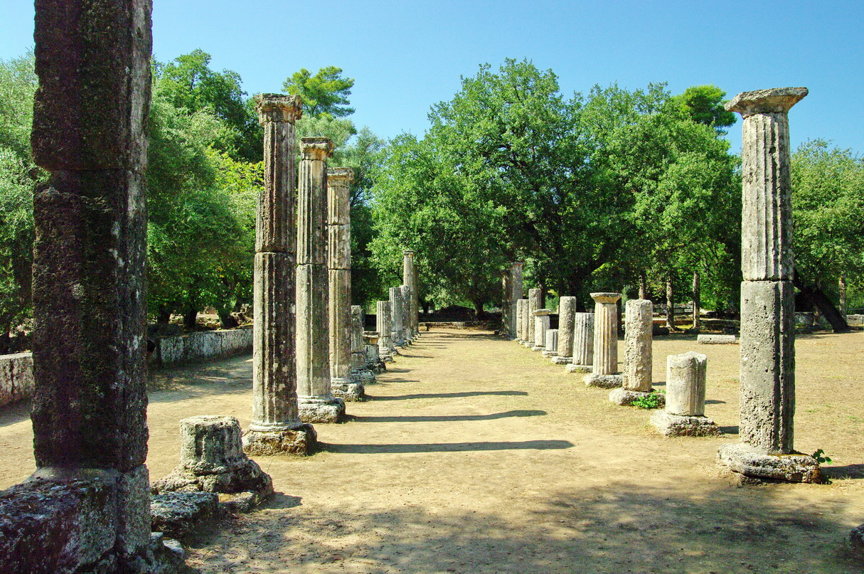 Olympia: Palaestra